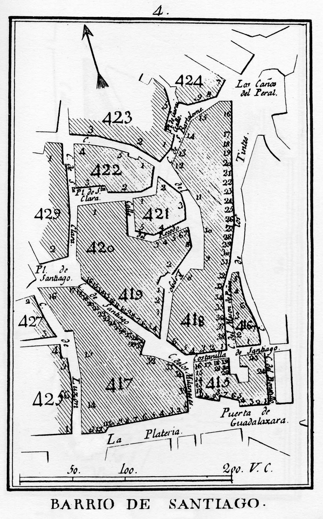 Plano de la Villa de Madrid. Barrio de Santiago en 1800. Autor Fausto Martínez de la Torre. Edición facsímil de la editorial Asociación de Libreros de Lance de Madrid, 1999.